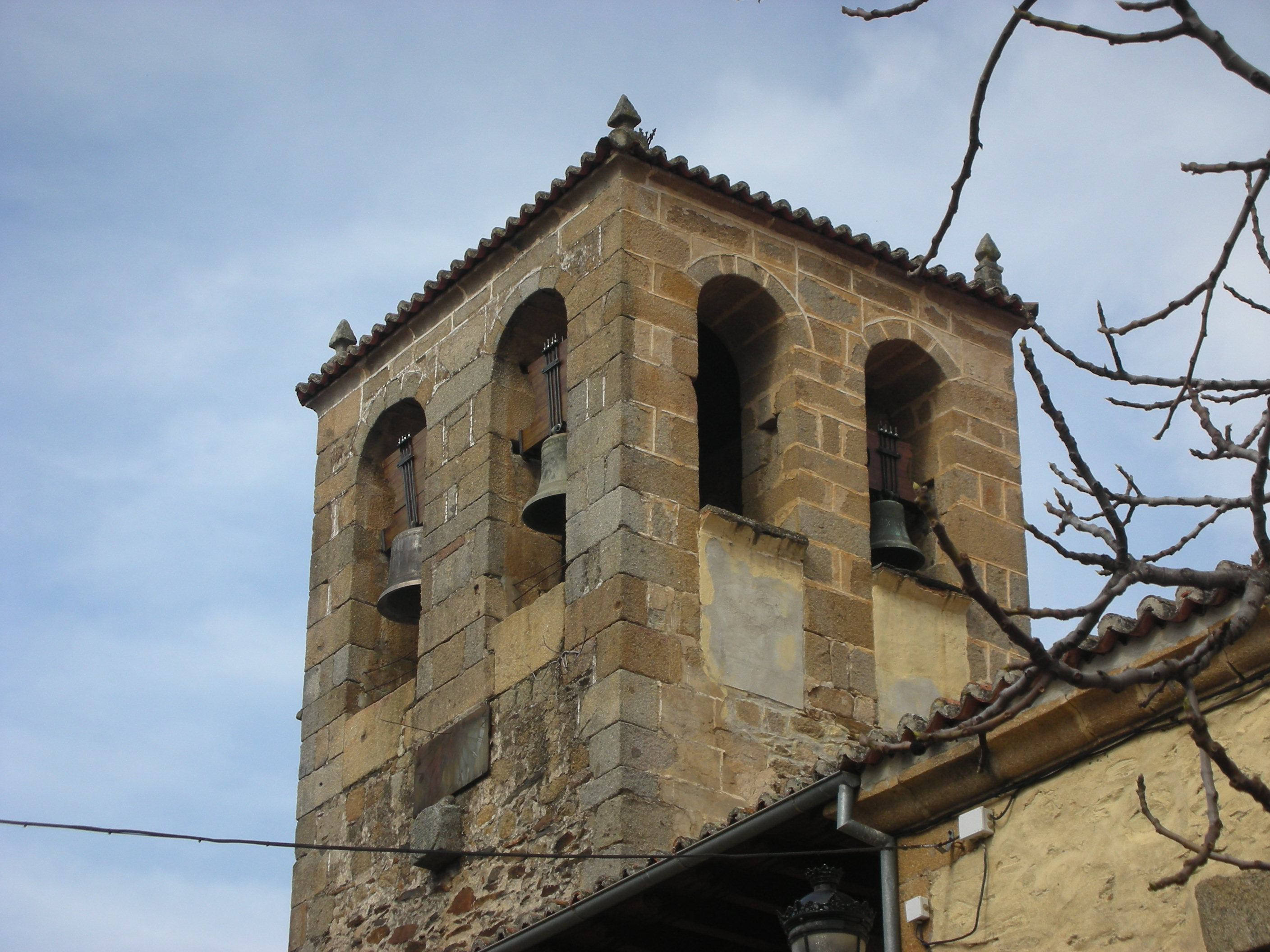 Campanile de l'église Nuestra Señora de la Asunción de la Commune de Sotoserrano en Espagne